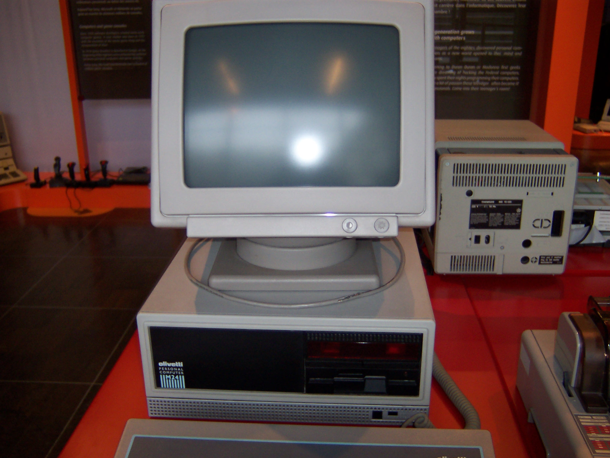 Fotos von historischen Computern in der Grande Arche